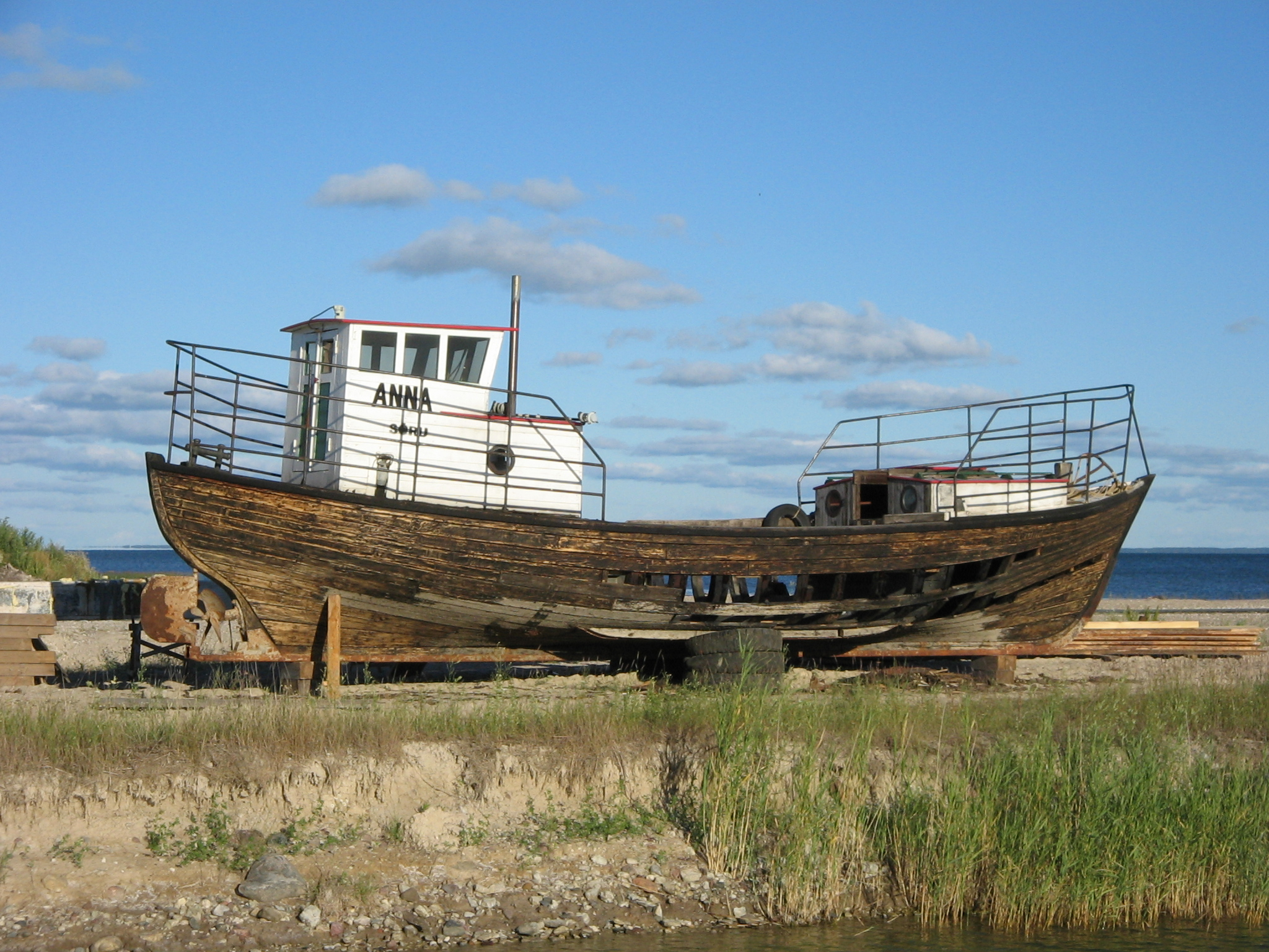 Sõru sadamas asuv laev